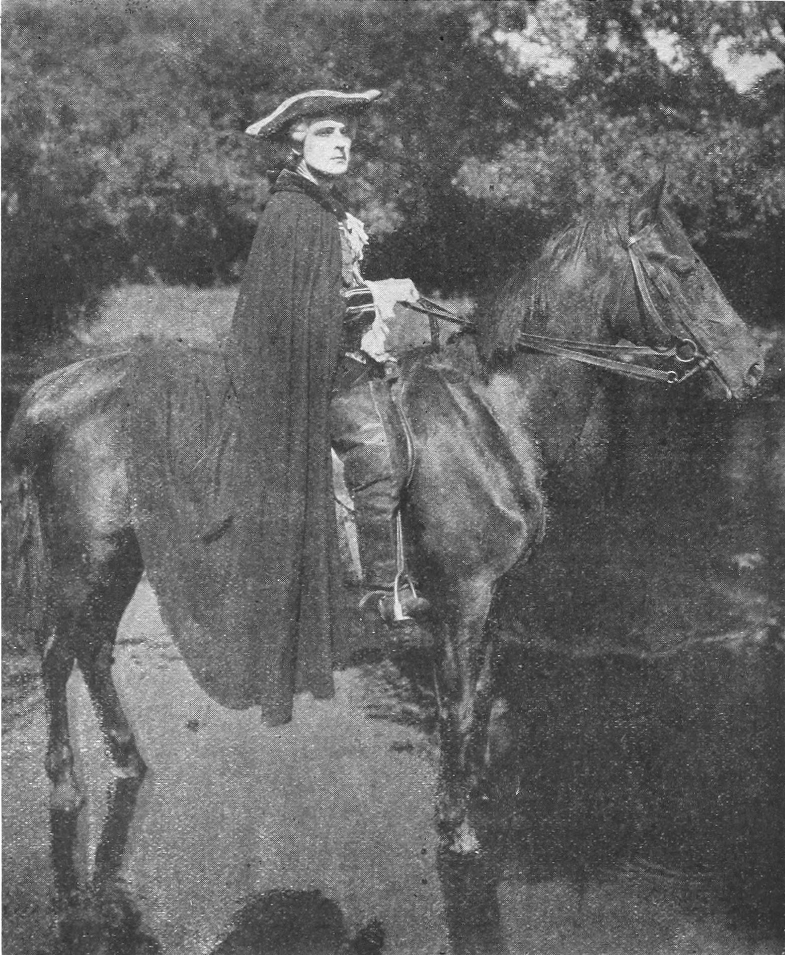 Photo de film